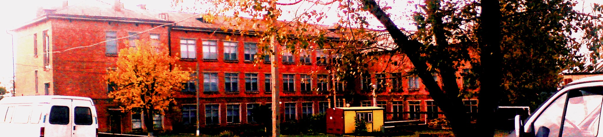 Школа в Затишье